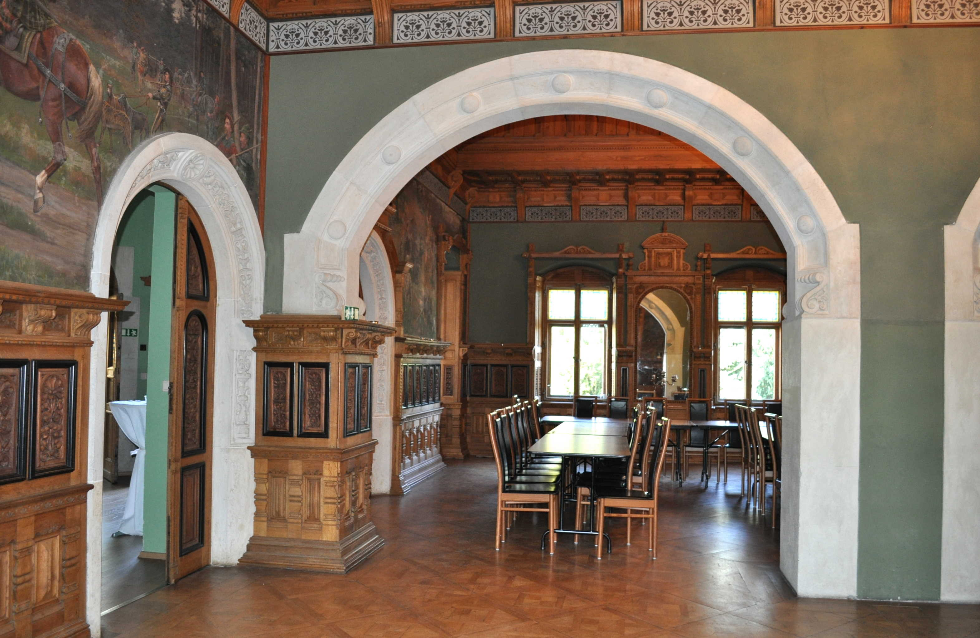 Schloss Schönfeld in der Gemeinde Schönfeld (Sachsen). Erstmals im 13. Jahrhundert urkundlich erwähnt und im Laufe der Jahrhunderte weiter ausgebaut. Es ist heute eines der bedeutendsten Neorenaissanceschlösser Sachsens. Festsaal